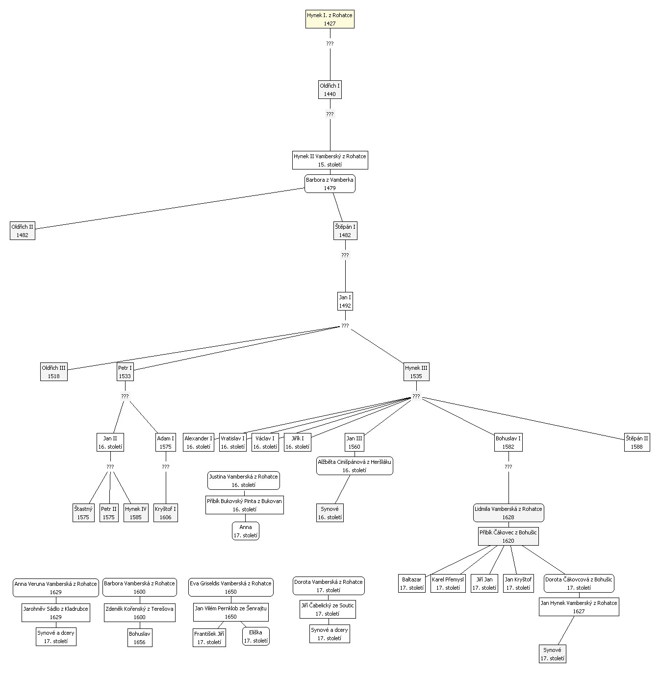 Rodokmen rytířské rodiny Vamberských z Rohatce - ranný.